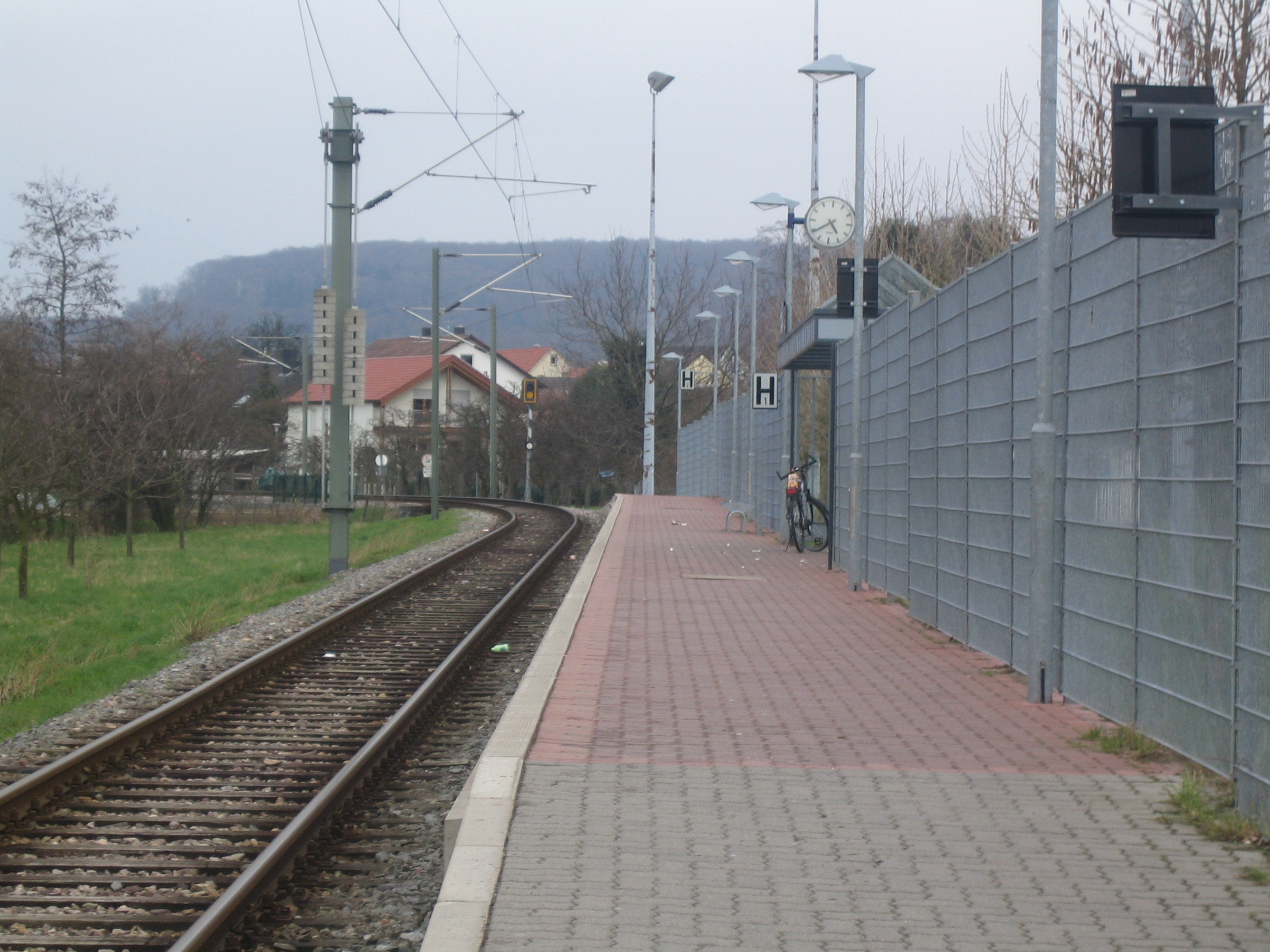 Hp. "Zeutern Sportplatz", selbst fotografiert